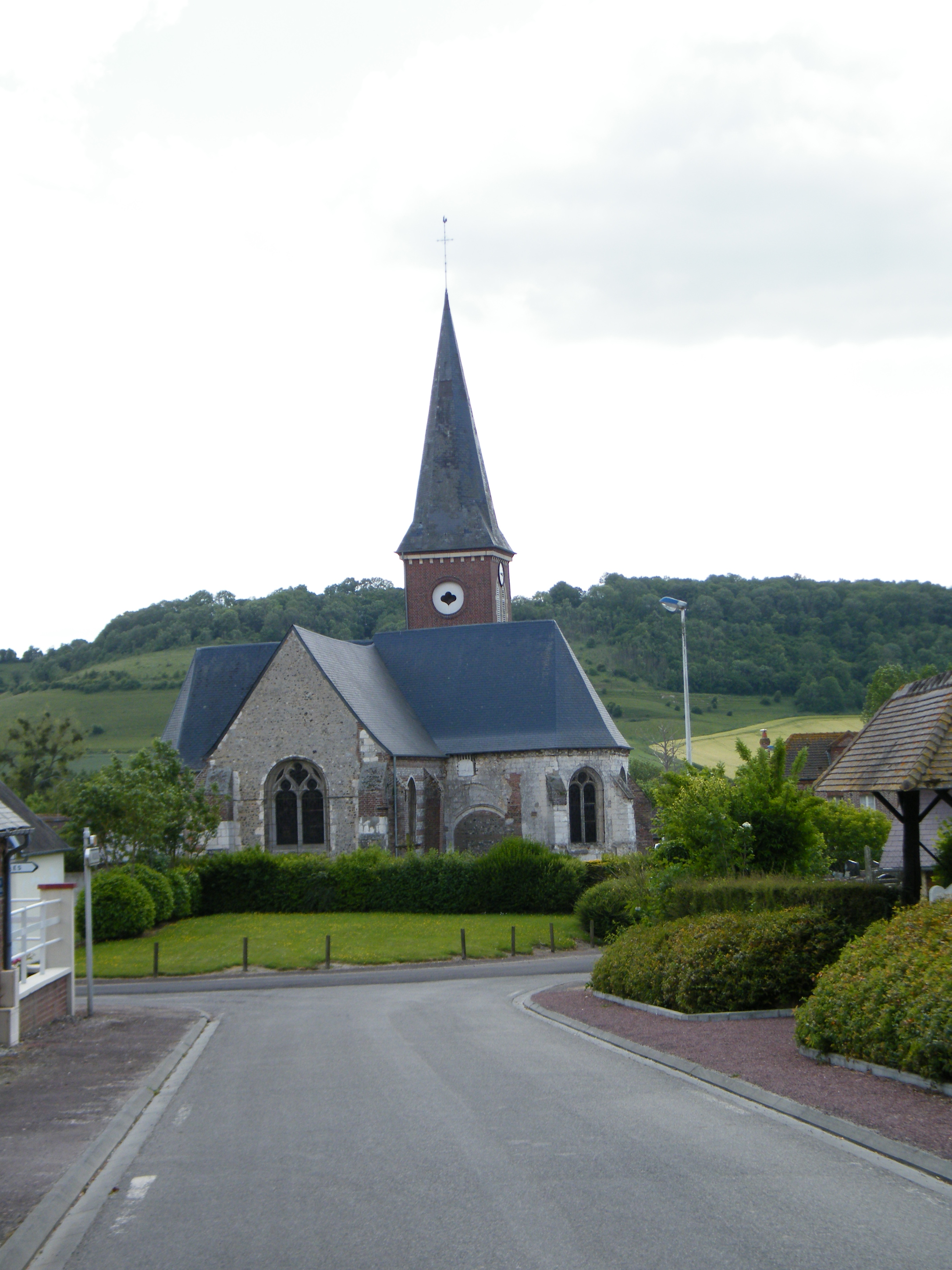 .Bâtiment communal